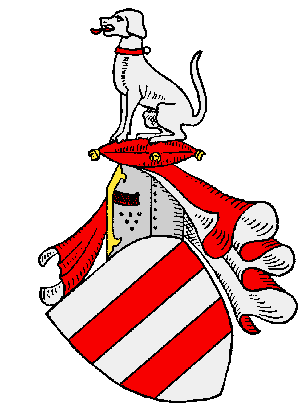 Wappen derer von Leublfing